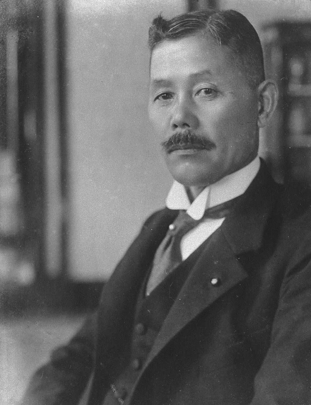 Portrait of Wakatsuki Reijiro (若槻礼次郎, 1866 – 1949)